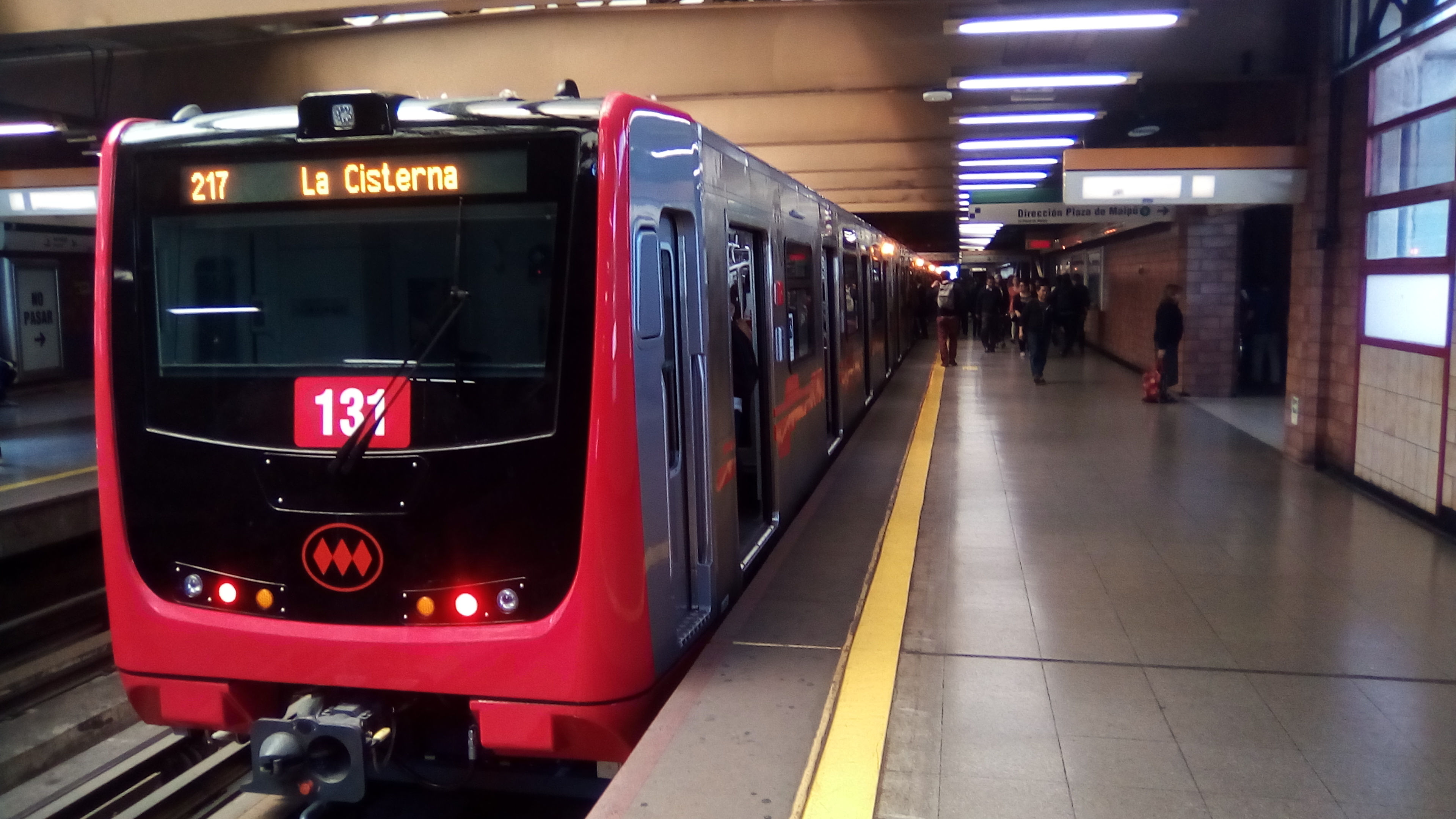 Tren NS-2016 en estación Santa Ana L2, Foto de autoria propia